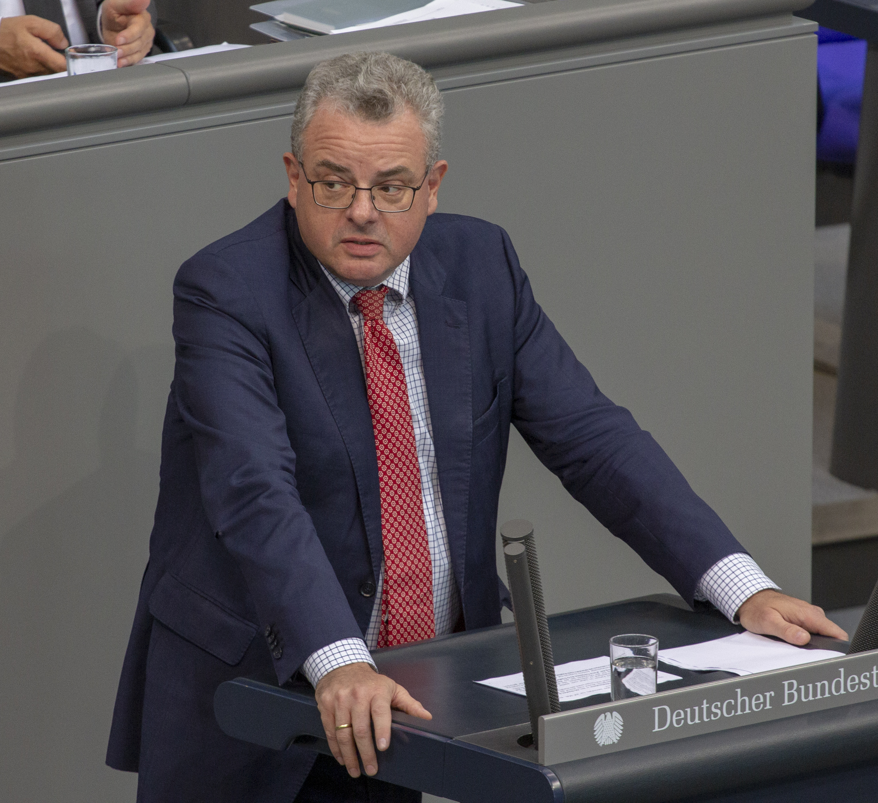 Andreas Nick Mitglied des Deutschen Bundestages während einer Plenarsitzung am 9. Mai 2019 in Berlin.